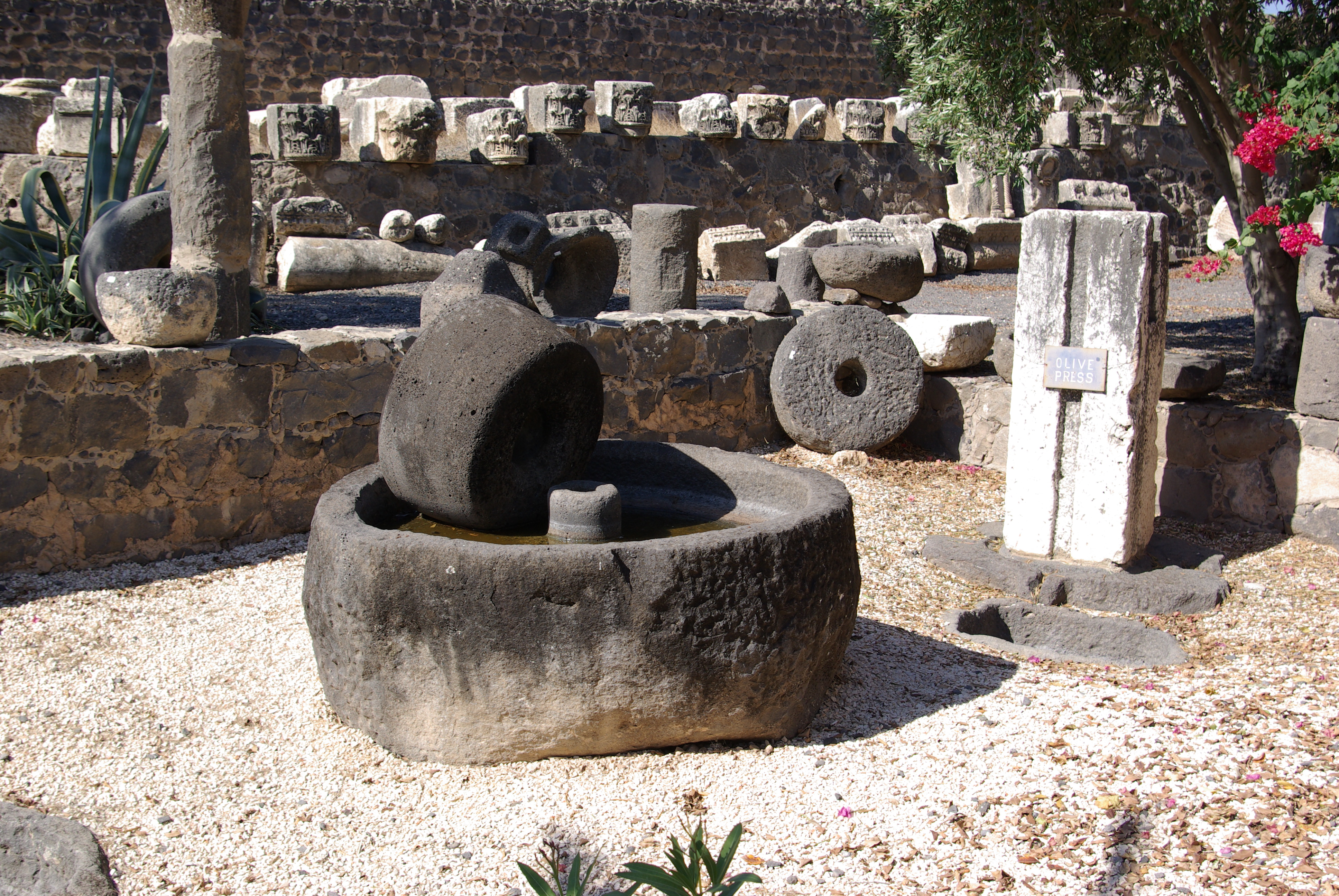 Kafarnaum